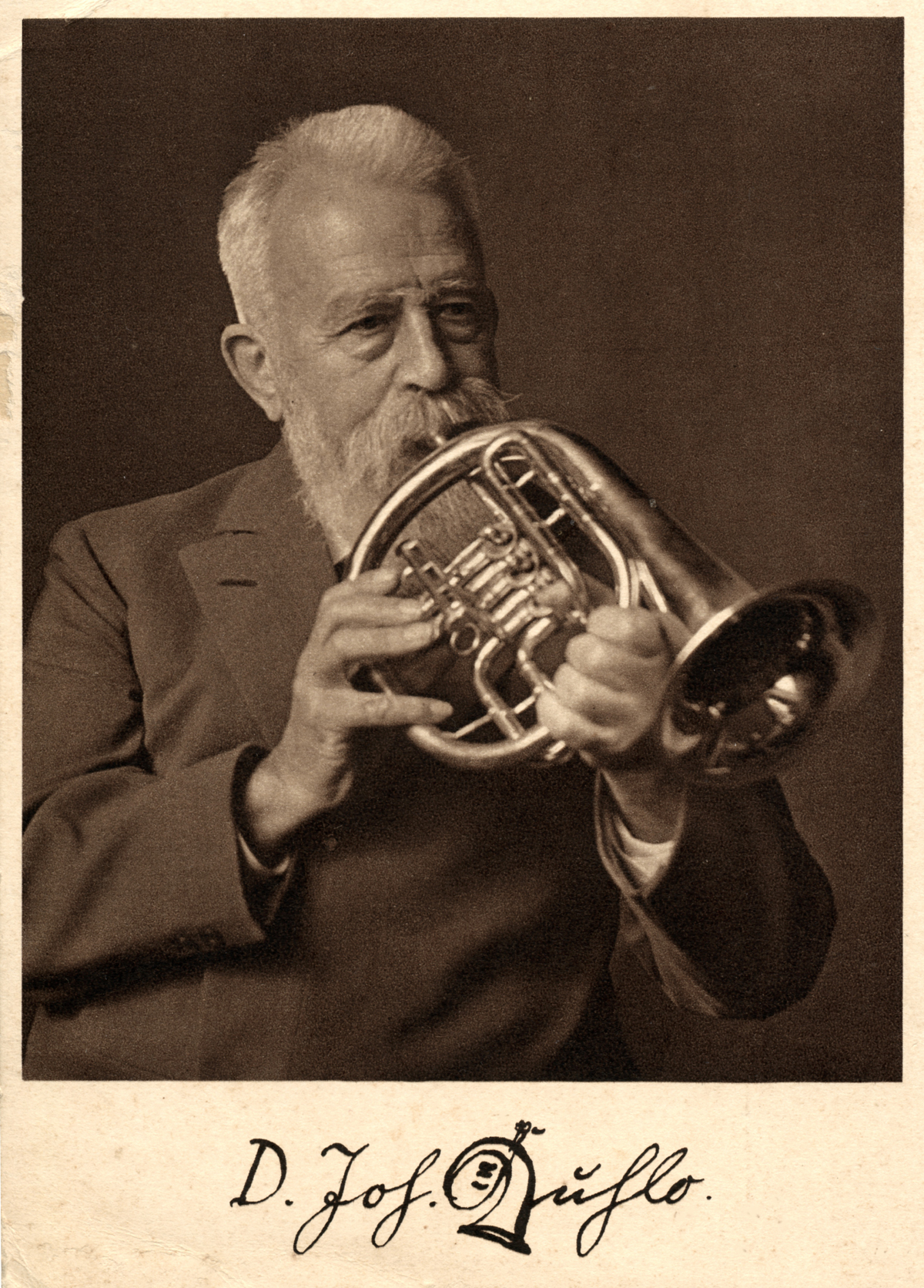 Johannes Kuhlo (1936). Pfarrer Karl Friedrich Johannes Kuhlo (* 08. Oktober 1856 in Gohfeld, heute Löhne, Kreis Herford, Nordrhein-Westfalen; † 16. Mai 1941 in Bielefeld-Bethel) gilt zusammen mit seinem Vater, Pfarrer Eduard Gotthelf Kuhlo (1822-1891), als Gründer der evangelischen Posaunenchorbewegung in Deutschland. Postkarte zum Reichsposaunentag in Bielefeld / 10.-12. Oktober 1936 / Lichtbild: Paul Gathmann, Essen / Kupfertiefdruck W. Giradet, Essen (Rückseitendruck)